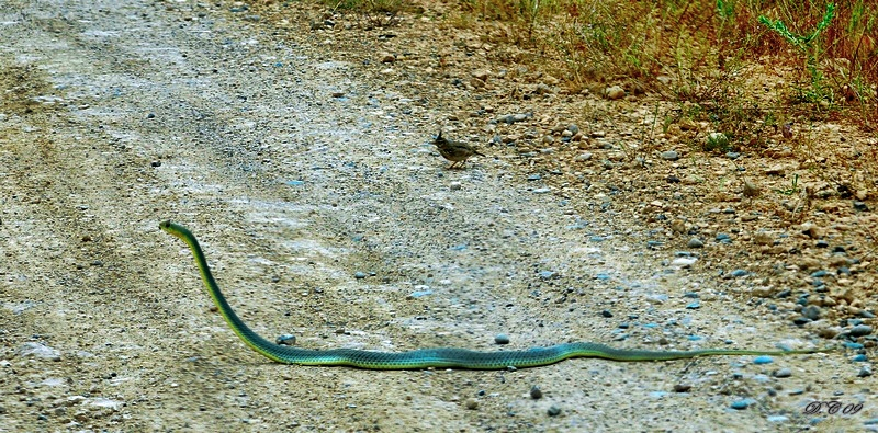 Kurdî: Ev wêne li ser rêya Stewrê li nêzî Gundê Hecî Fariz hatiye kişandin.navê wî yê Latînkî "Malpalon monspessulanus" e